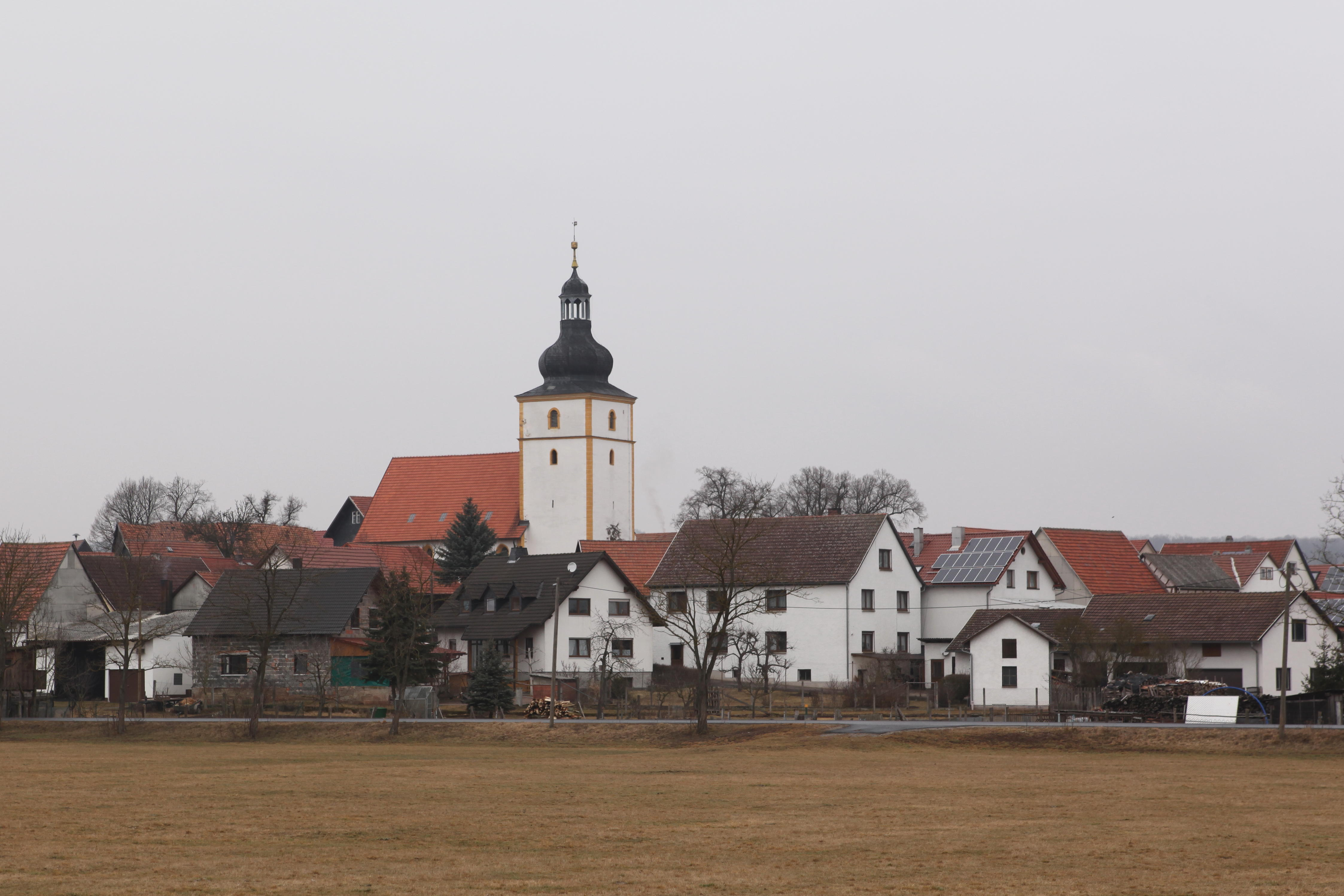 Gompertshausen, Landkreis Hildburghausen